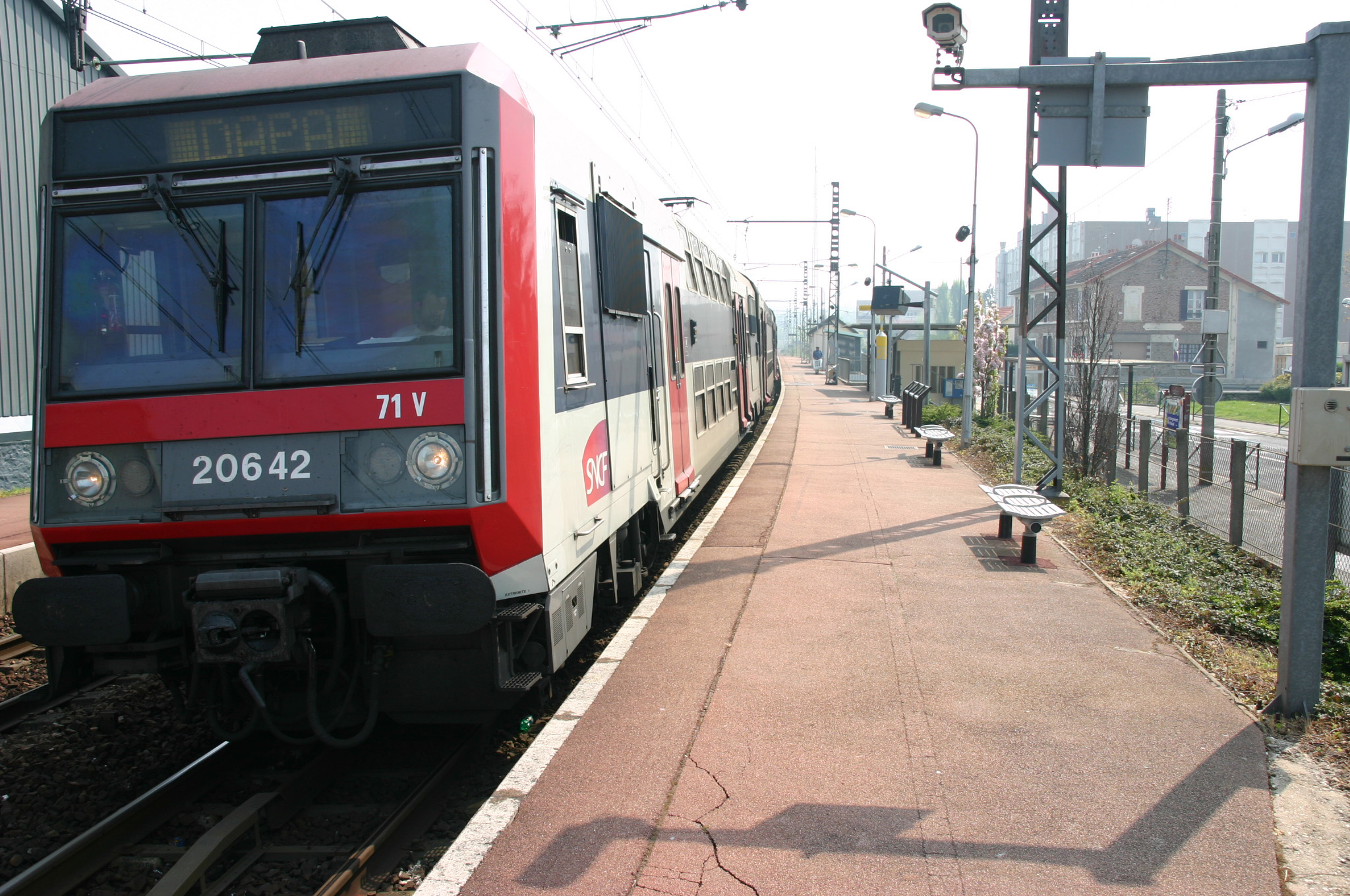 La gare de Villabé, Villabé, département de l'Essonne (France)